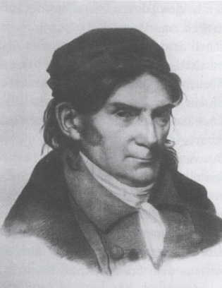 Bildnis des Greifswalder Professors Karl Schildener (1777–1843)